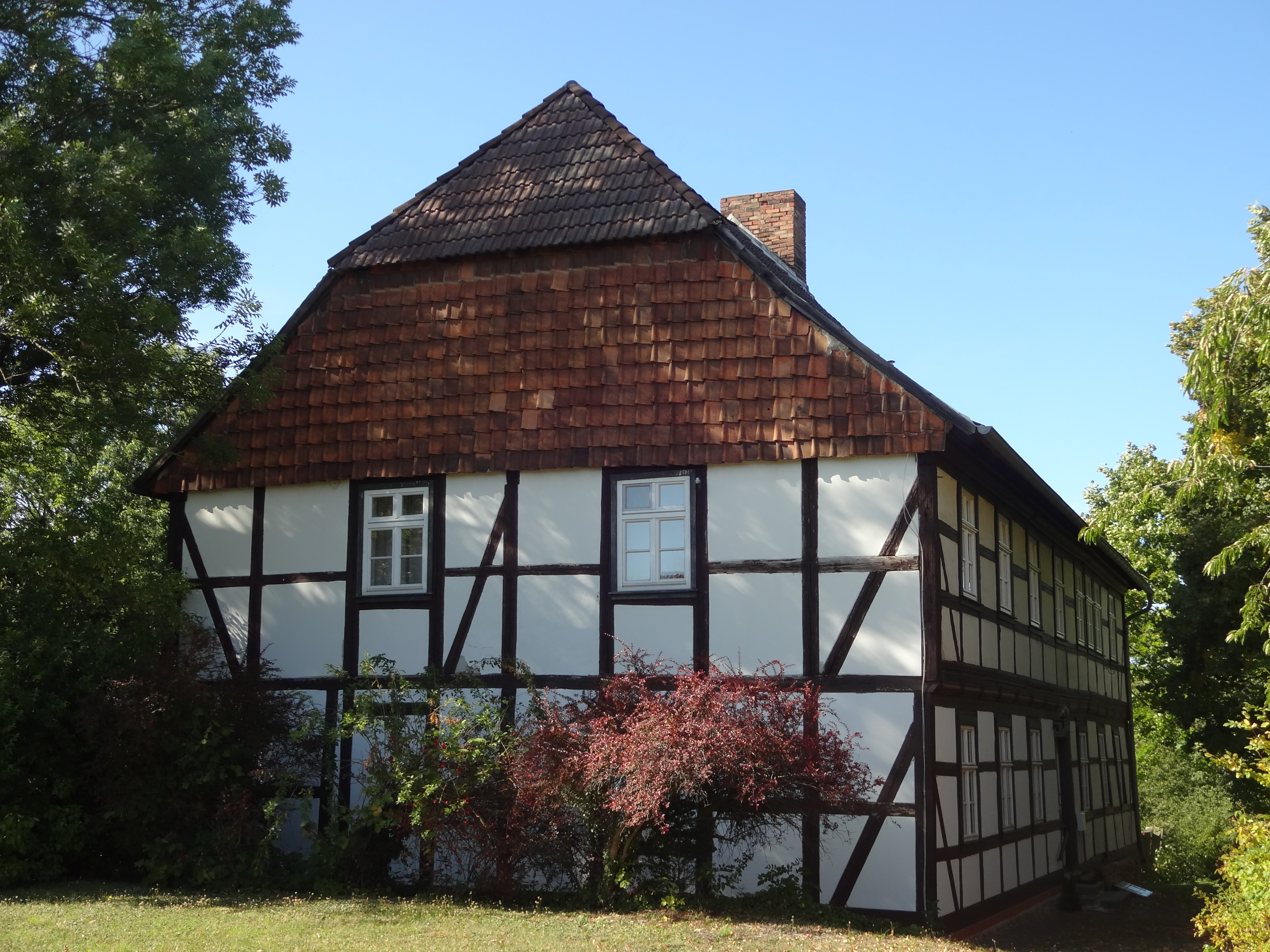 denkmalgeschütztes Pfarrhaus in der Schulstraße 12 in Drübeck